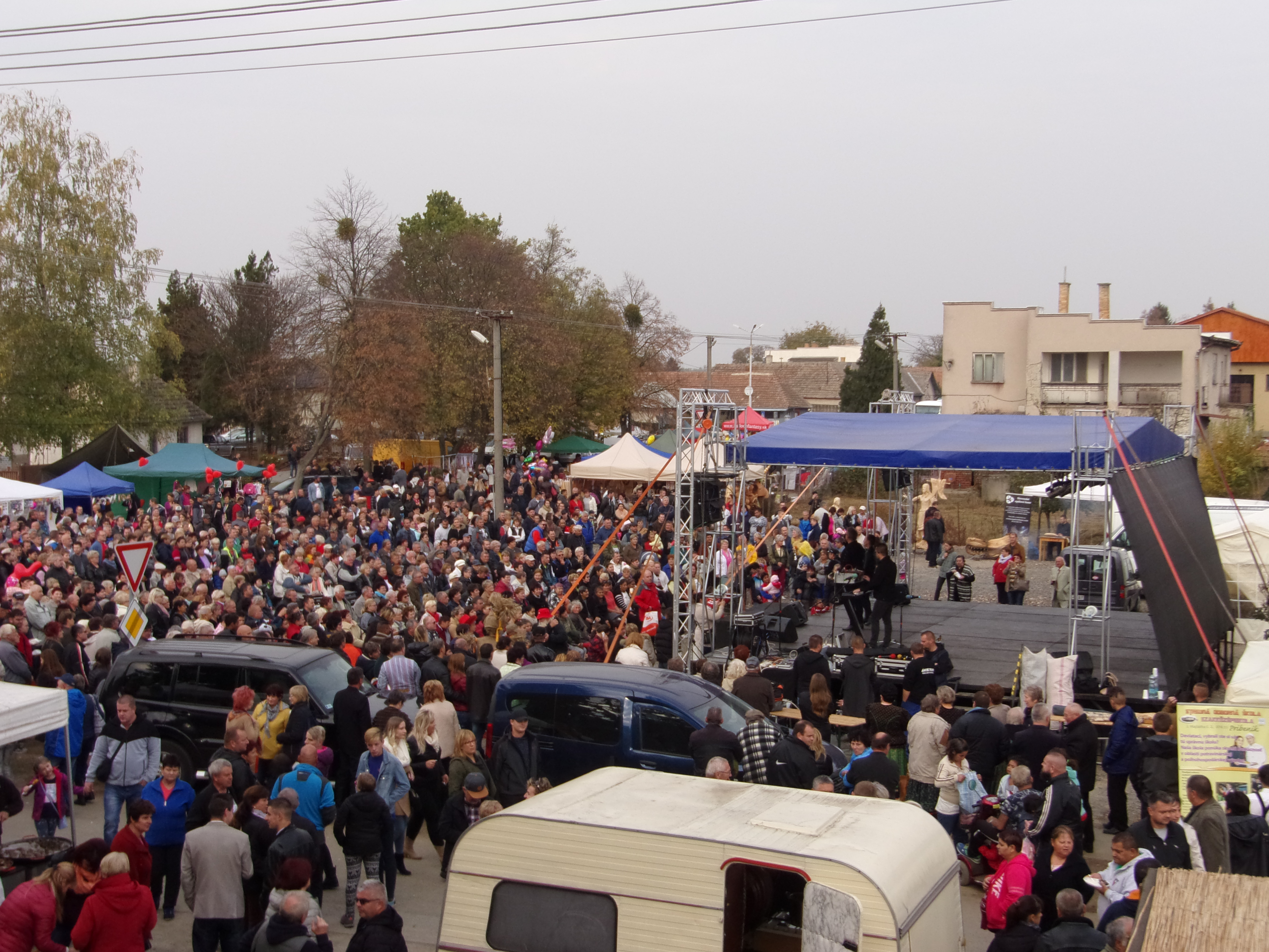 A 2018-as Libagaliba látogatói